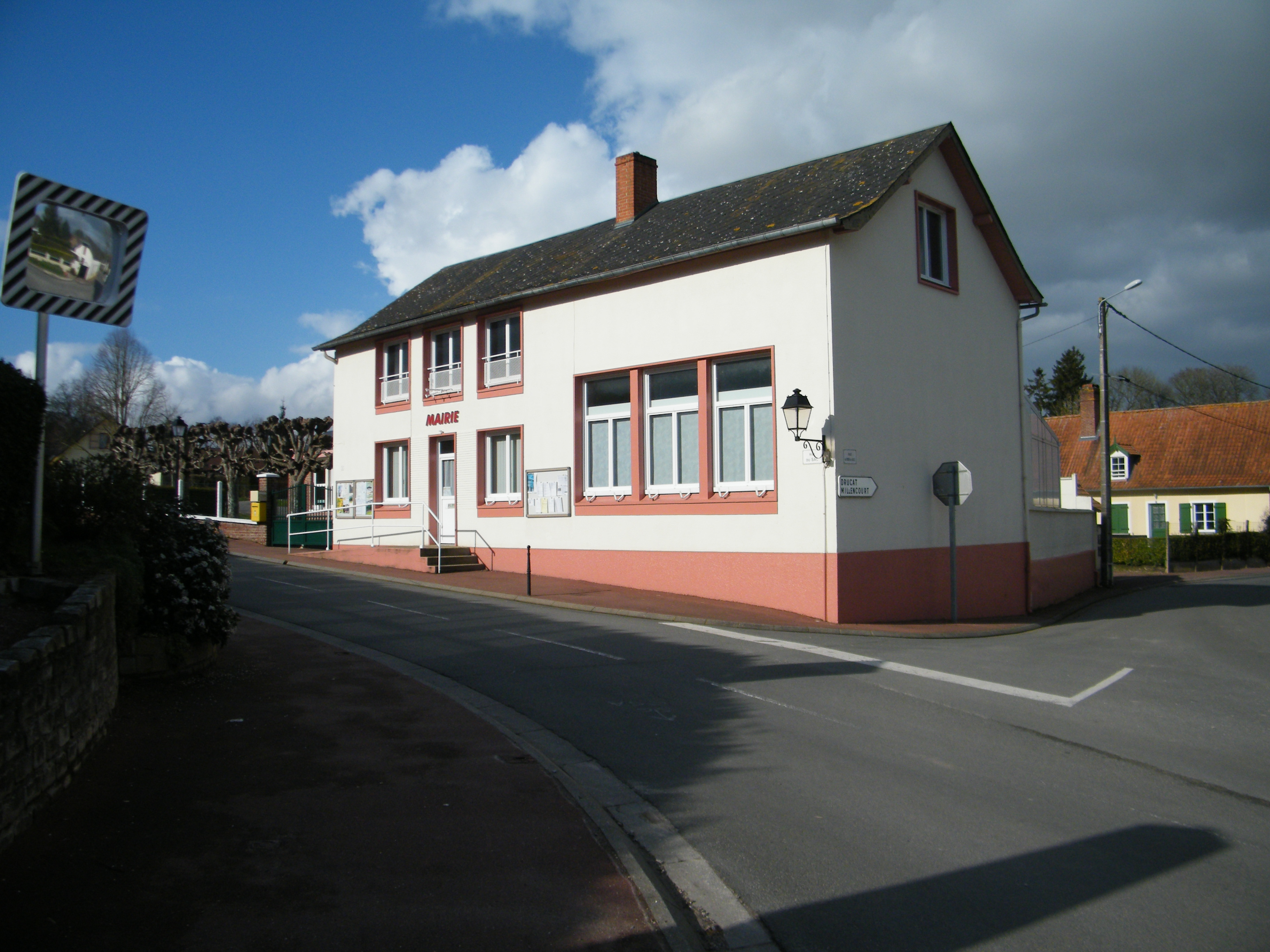 La mairie.